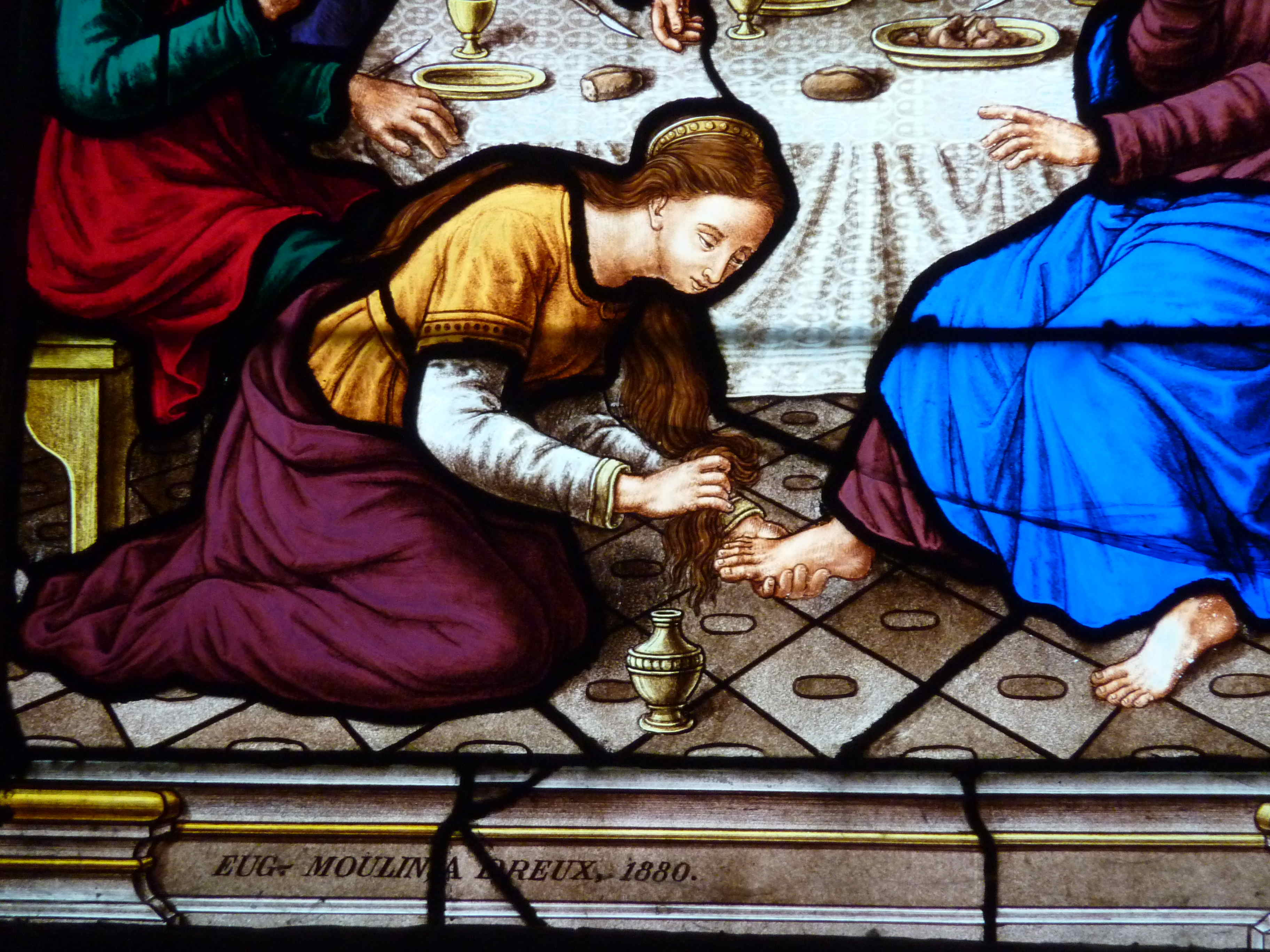 Katholische Kirche Saint-Pierre in Dreux im Département Eure-et-Loir (Centre-Val de Loire/Frankreich), Bleiglasfenster mit Signatur: EUG. MOULIN A DREUX. 1880, in der Kapelle Sacré-Coeur; Darstellung: Szenen aus dem Leben und Wirken Jesu; Ausschnitt unten links: Maria Magdalena salbt Jesus die Füße